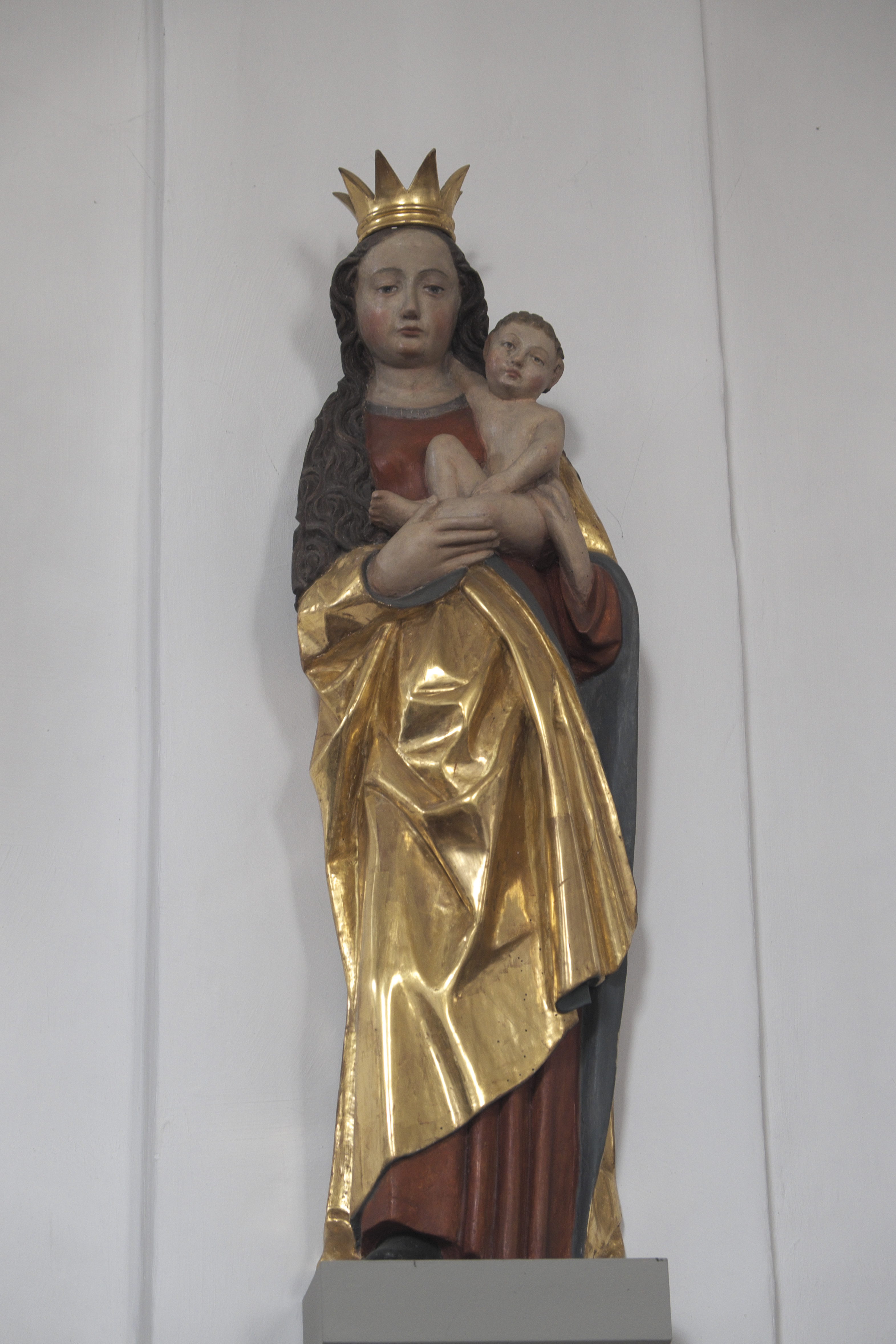 Katholische Pfarrkirche Sankt Emmeram in Geisenhausen (Schweitenkirchen) im oberbayerischen Landkreis Pfaffenhofen an der Ilm (Bayern/Deutschland), Madonna mit Kind, um 1500